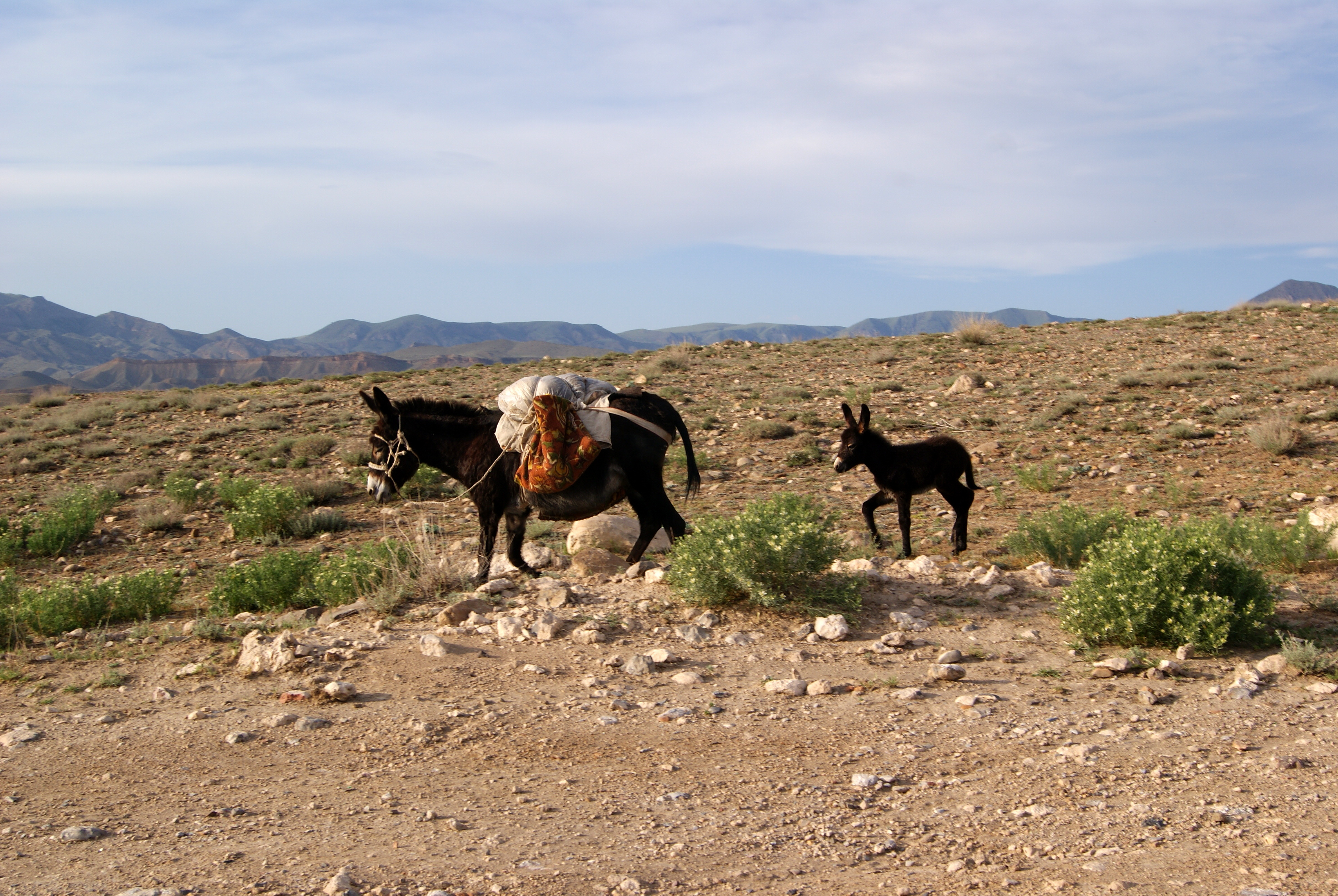 Գոռավանի ավազուտներ արգելավայր